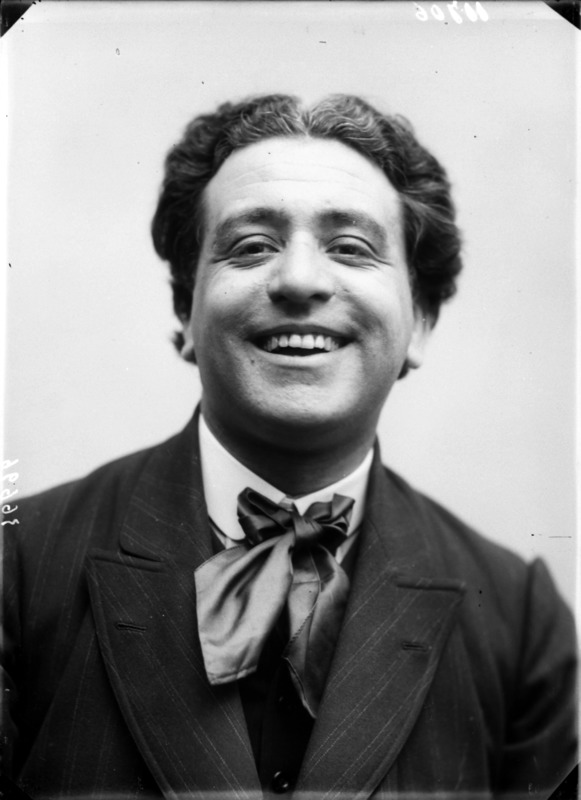 Alfredo Robert fotografato da Mario Nunes Vais